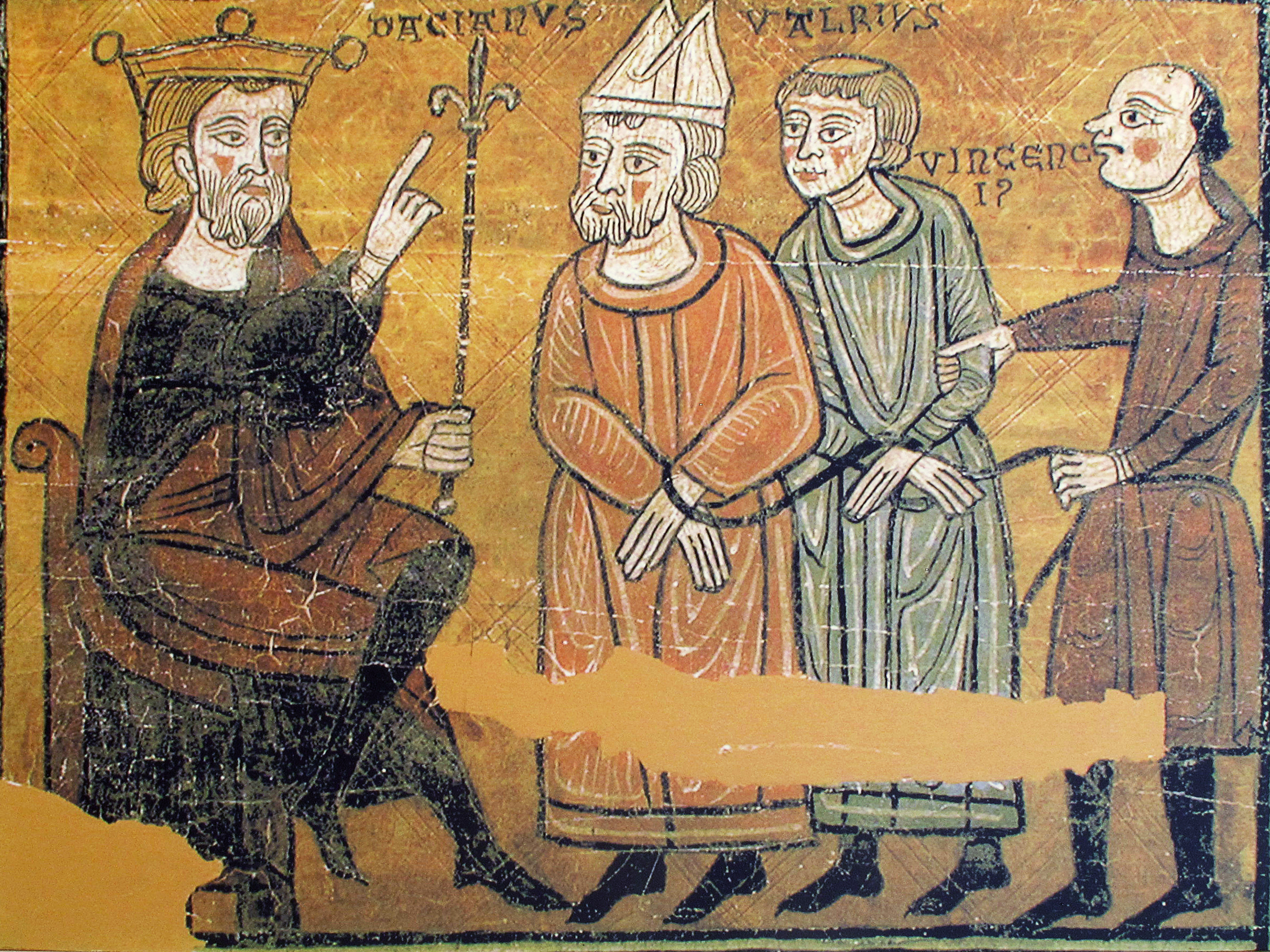 Reproduccion en la Catedral de Alcala de Henares de una parte del Frontal de finales del S XIII con 12 escenas del martirio de San Vicente La pintura original esta realizada en pergamino, es un magnífico frontal, que se encoló sobre tabla. Su estilo, tiende más al románico que al gotico Petenecio a la antigua parroquial románica de Liesa, hoy en ruinas, con posterioridad, estuvo en la ermita de Santa María del Monte de Liesa en Huesca La vida de san Vicente fue pareja a la del Obispo San Valero, patrón de Zaragoza